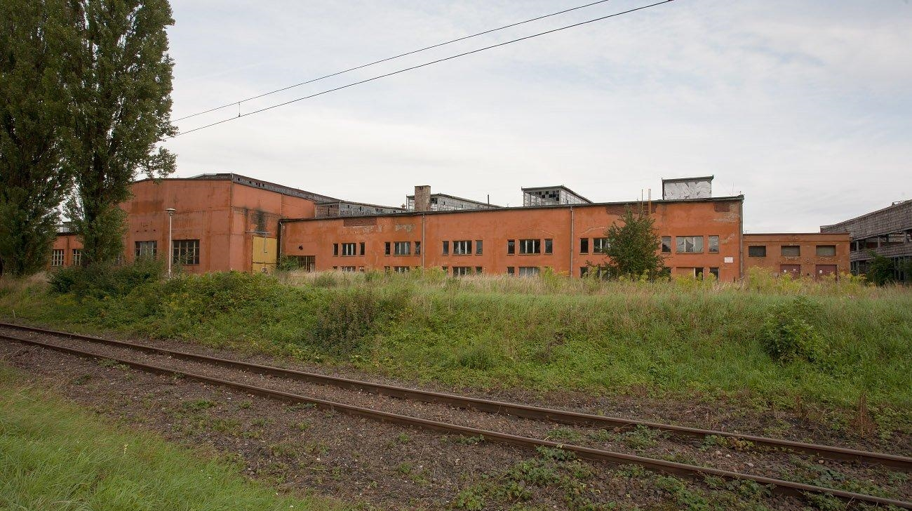 Parowozownia mieściła 24 stanowiska napraw parowozów oraz pomieszczenia biurowe i socjalne dla maszynistów.